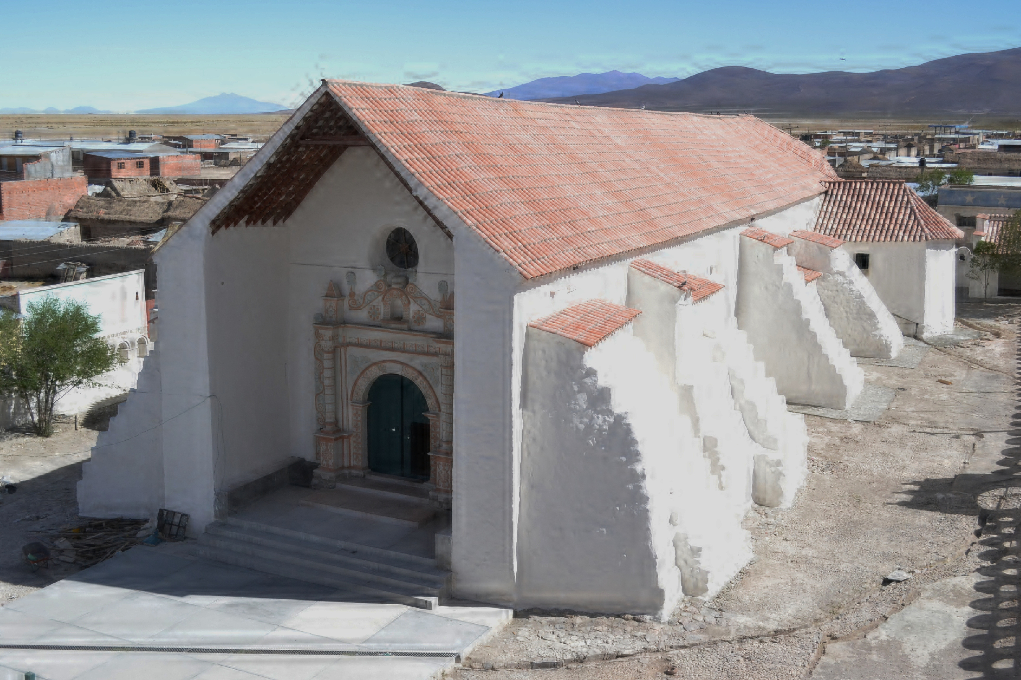 Santuario de Nuestra Señora de Sabaya This medium shows the protected monument with the number O/00-015 in Bolivia.